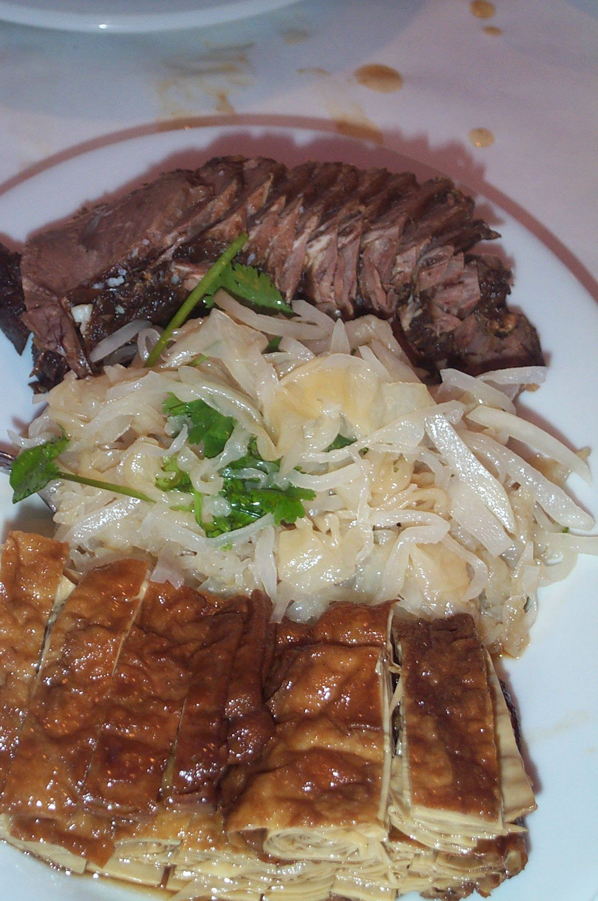 aperitivos.